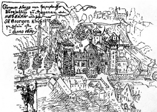 Kaiserpalz Hagenau (Haguenau)